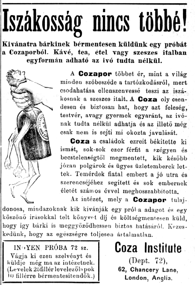 Gyógyszer reklám